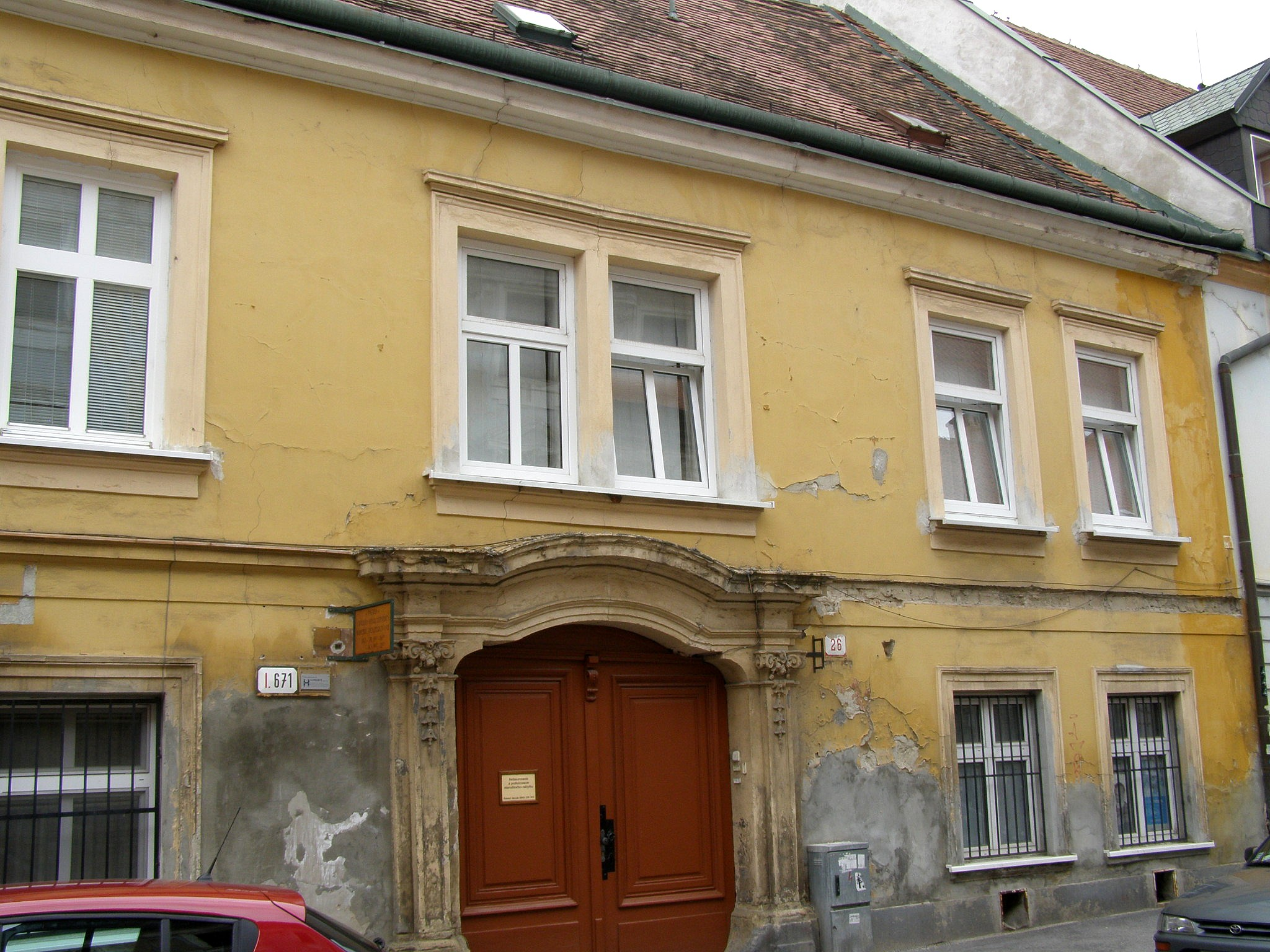 Panenská ul. č. 26